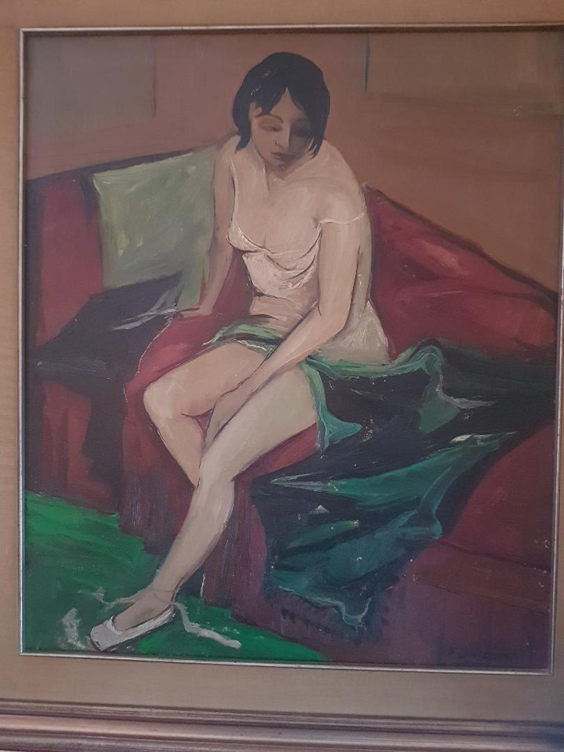 Opera del pittore Franco Dacquati, mia proprietà